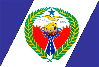 Bandeira de Terezópolis de Goiás, Brasil.